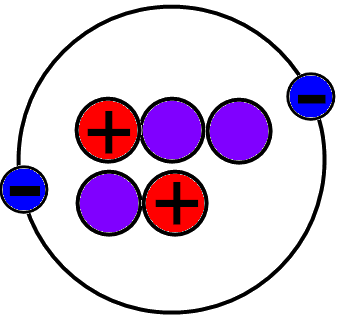 中文（台灣）: 氦-5的原子樣貌